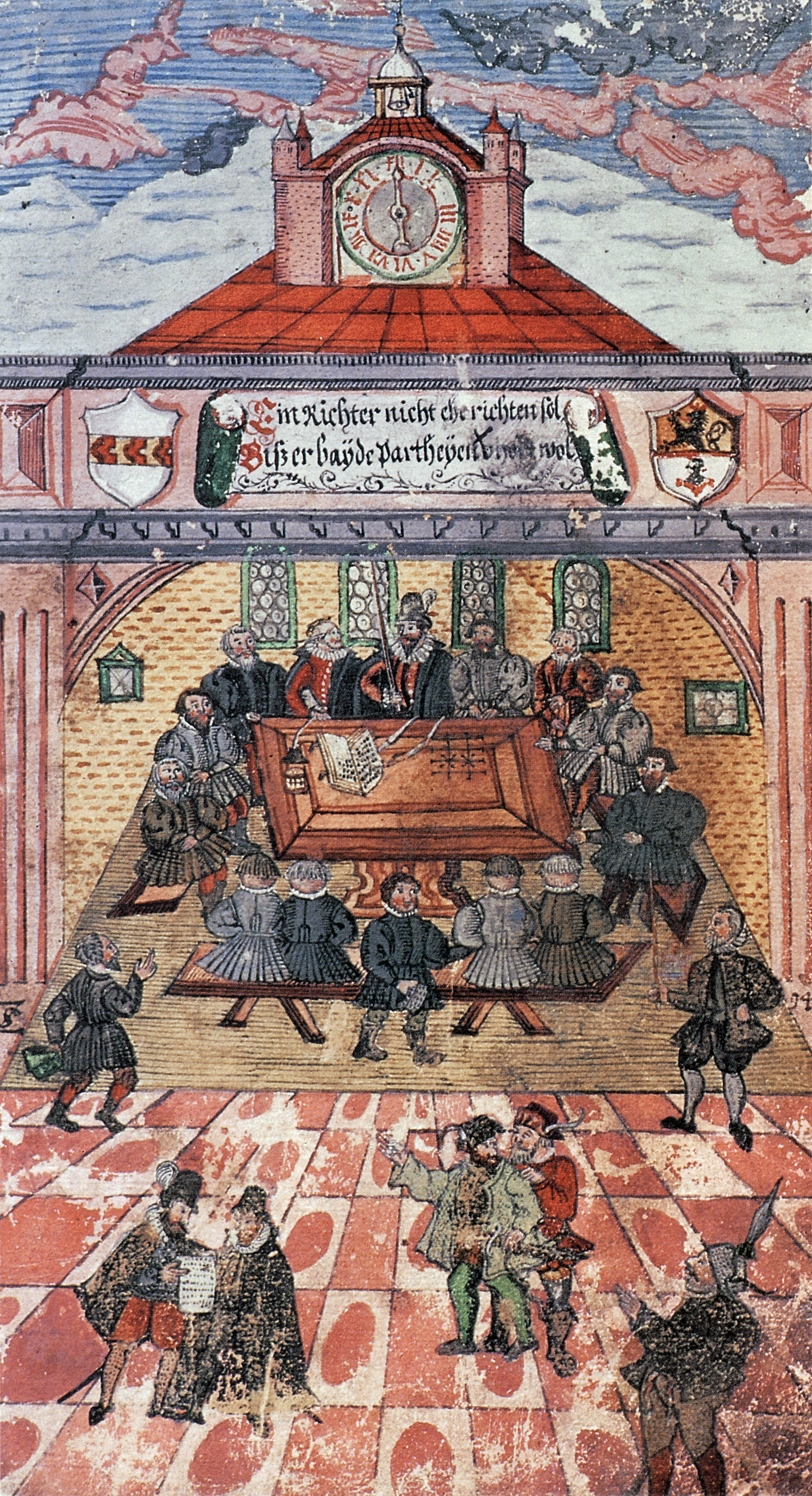 Das Zentgericht in Memmelsdorf. Gerichtsbuch des Vogtes Sebastian Zollner von Kirchschletten (kolorierte Zeichnung)